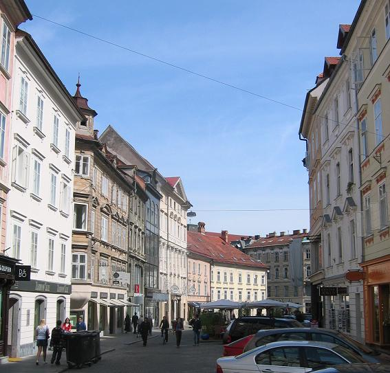 Mestni trg (square), Ljubljana photo:Ziga 05:37, 27 April 2006 (UTC)